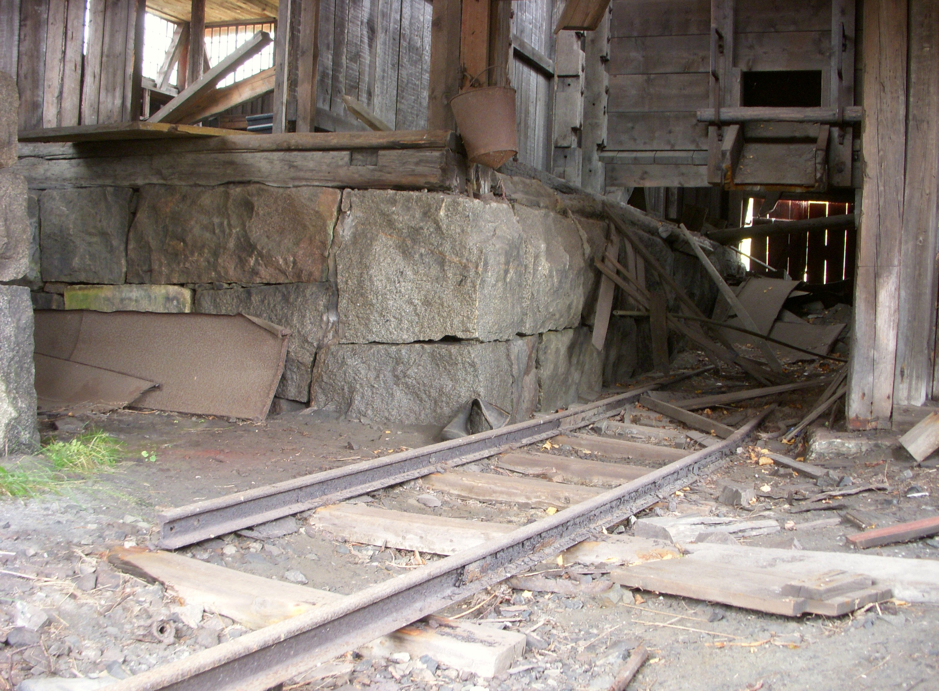 Bispbergs gruva, interiör